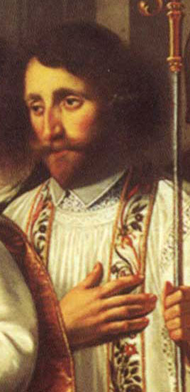 Bernardus van Clairvaux bekeert Willem van Aquitanië (detail: Willem de Swaen afgebeeld als één van de personages op het schilderij)